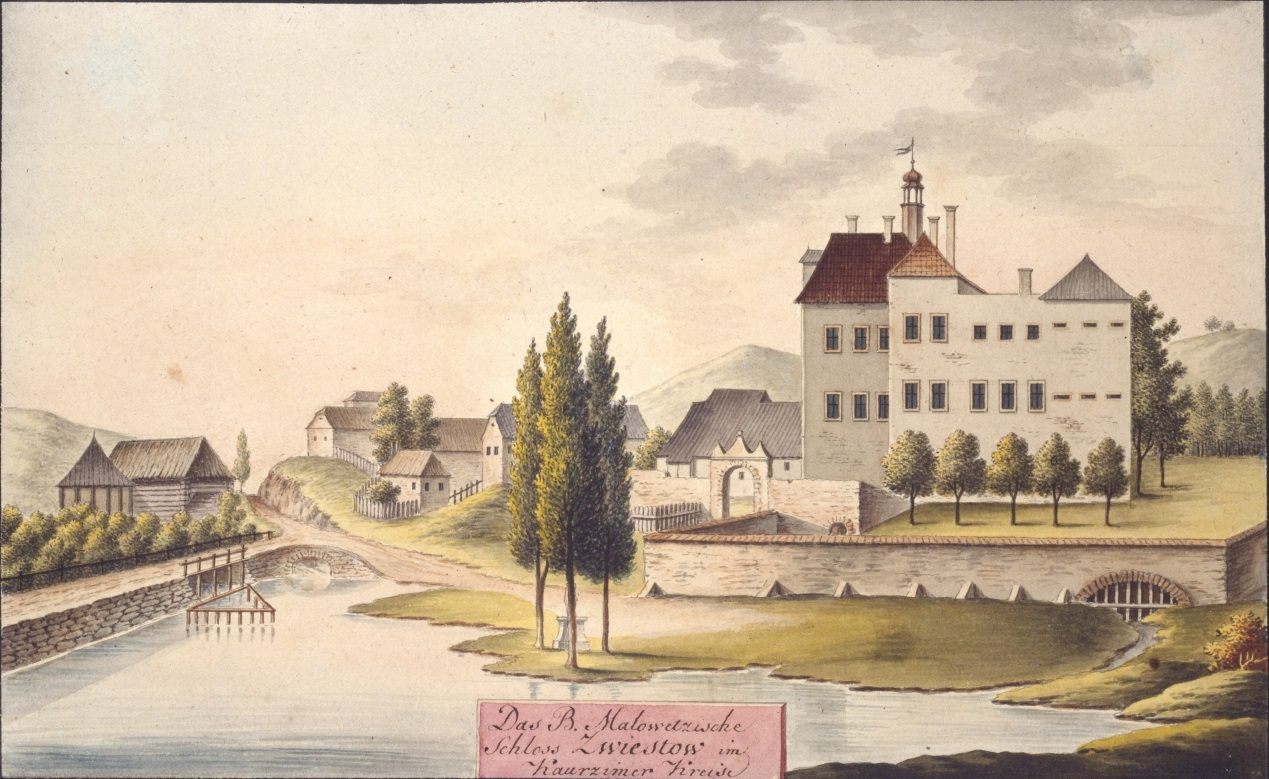 Zvěstov. Das B. Malowetzische Schloss Zwiestow im Kaurzimer Kreise